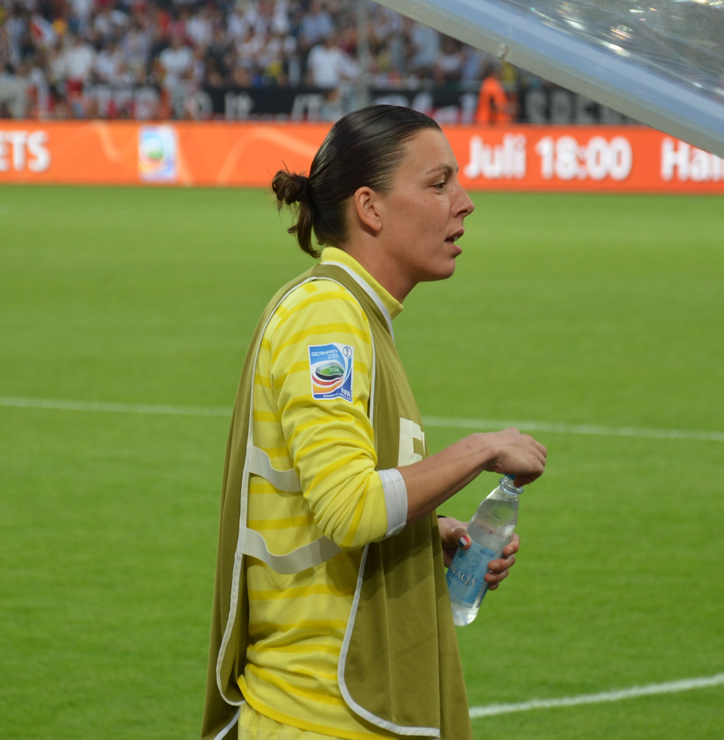 WM Vorrundenspiel zwischen Frankreich und Deutschland am 5. Juli 2011 im Borussiapark in Mönchengladbach